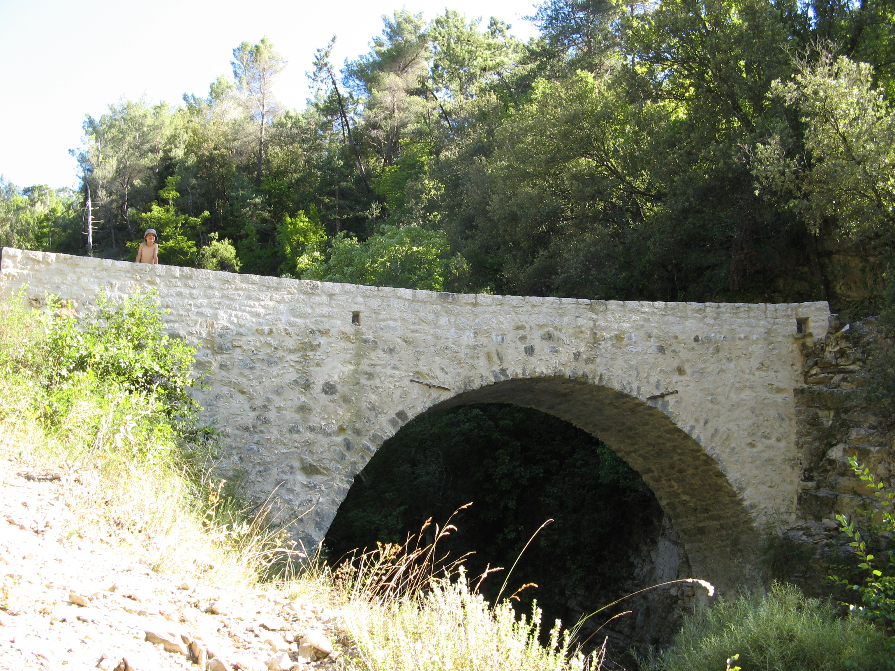 Pont romain au dessus du ruisseau de Gazouil situé dans le hameau de Virounours sur la commune de Peille